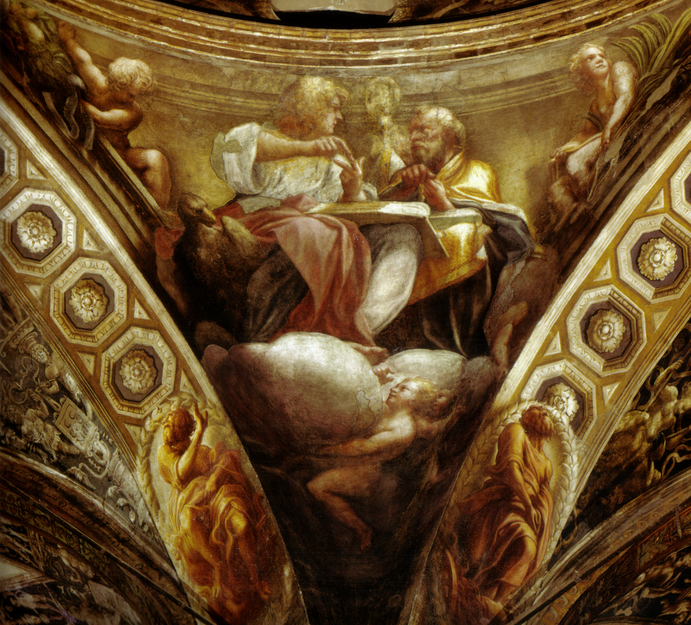 Correggio, cupola, santi marco e gregorio